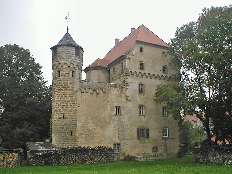 Schloss Grombach, erbaut auf den Überresten einer Wasserburg aus dem 14. Jhd., von der noch der Rundturm stammt. Nächstneuere Gebäudeteile datieren um 1544, zahlreiche Umbauten bis zur Gegenwart.